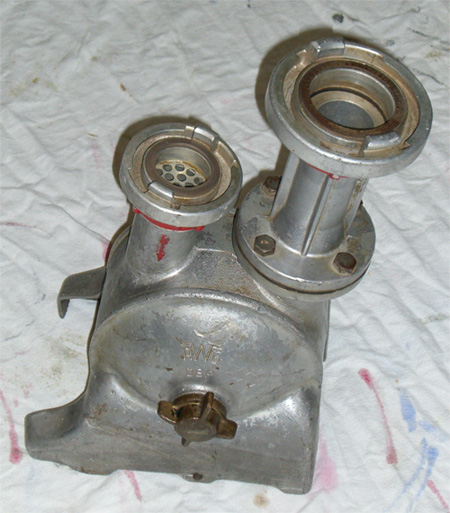 Foto des feuerwehrtechnischen Gerätes "Wasserstrahlpumpe" (Magnus Mertens)